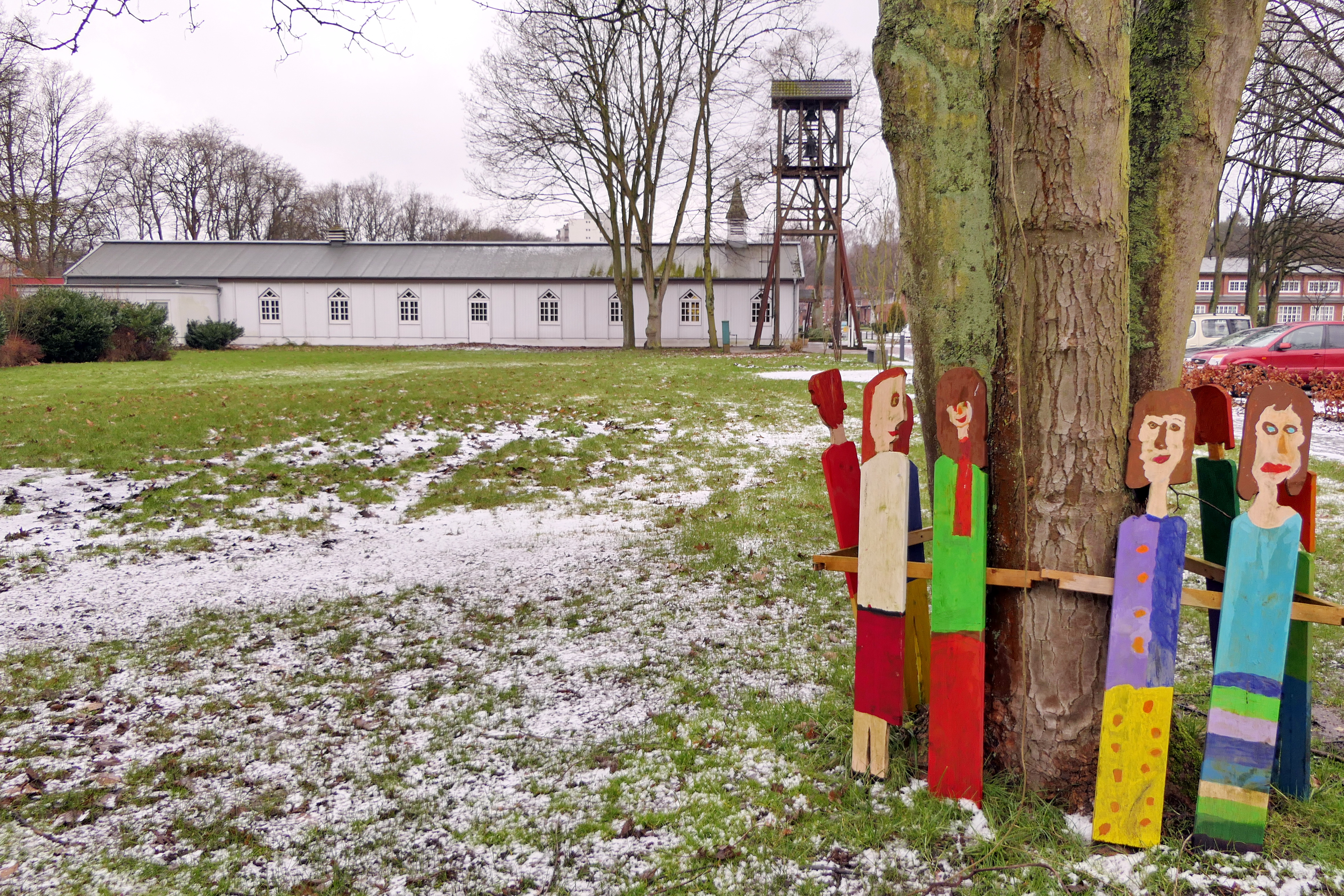 Blick auf die Kirche der Stiftung Friedehorst